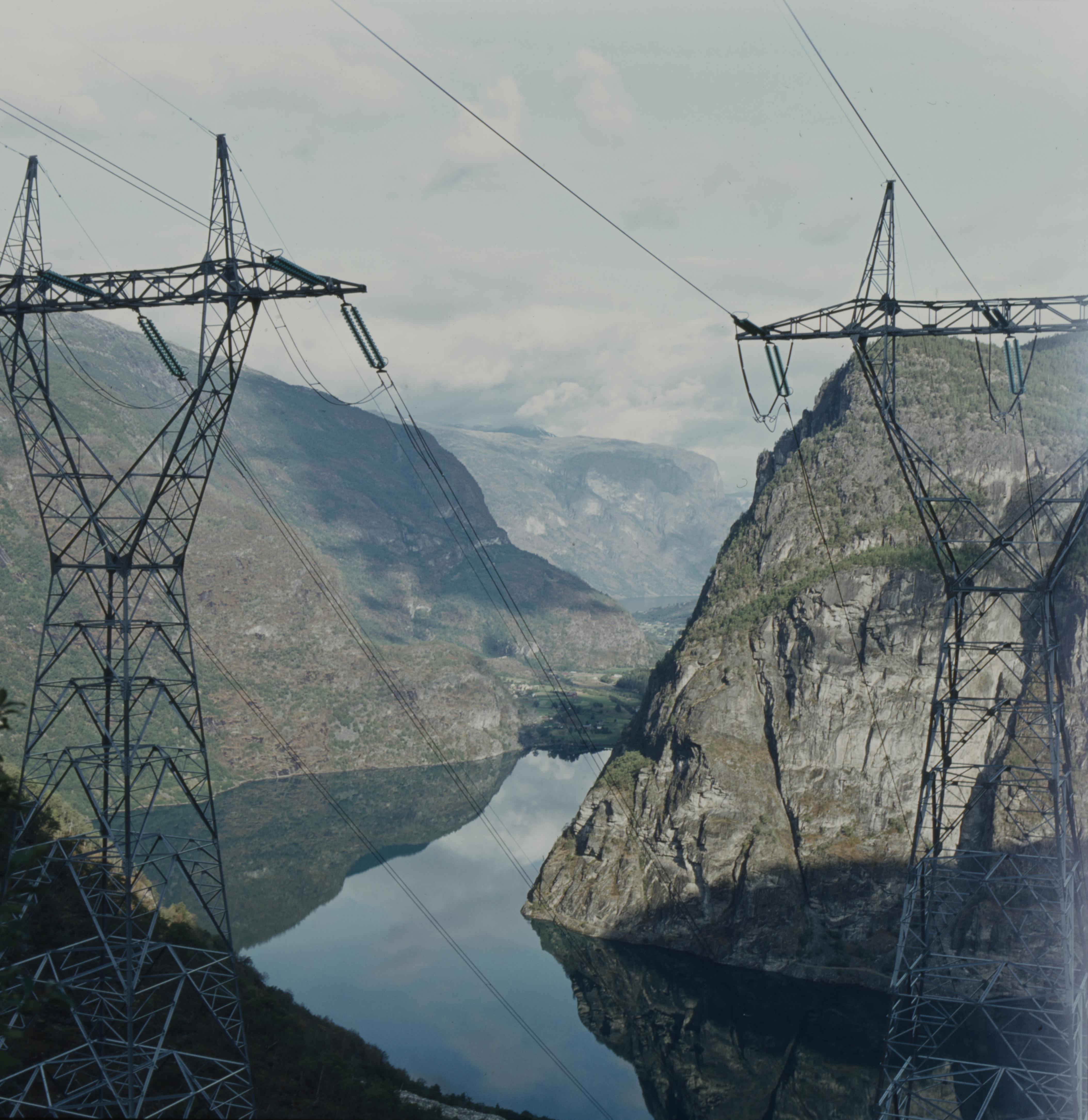 Kraftmaster, Vassbygdi, Aurland. Dato: 20.08.1982